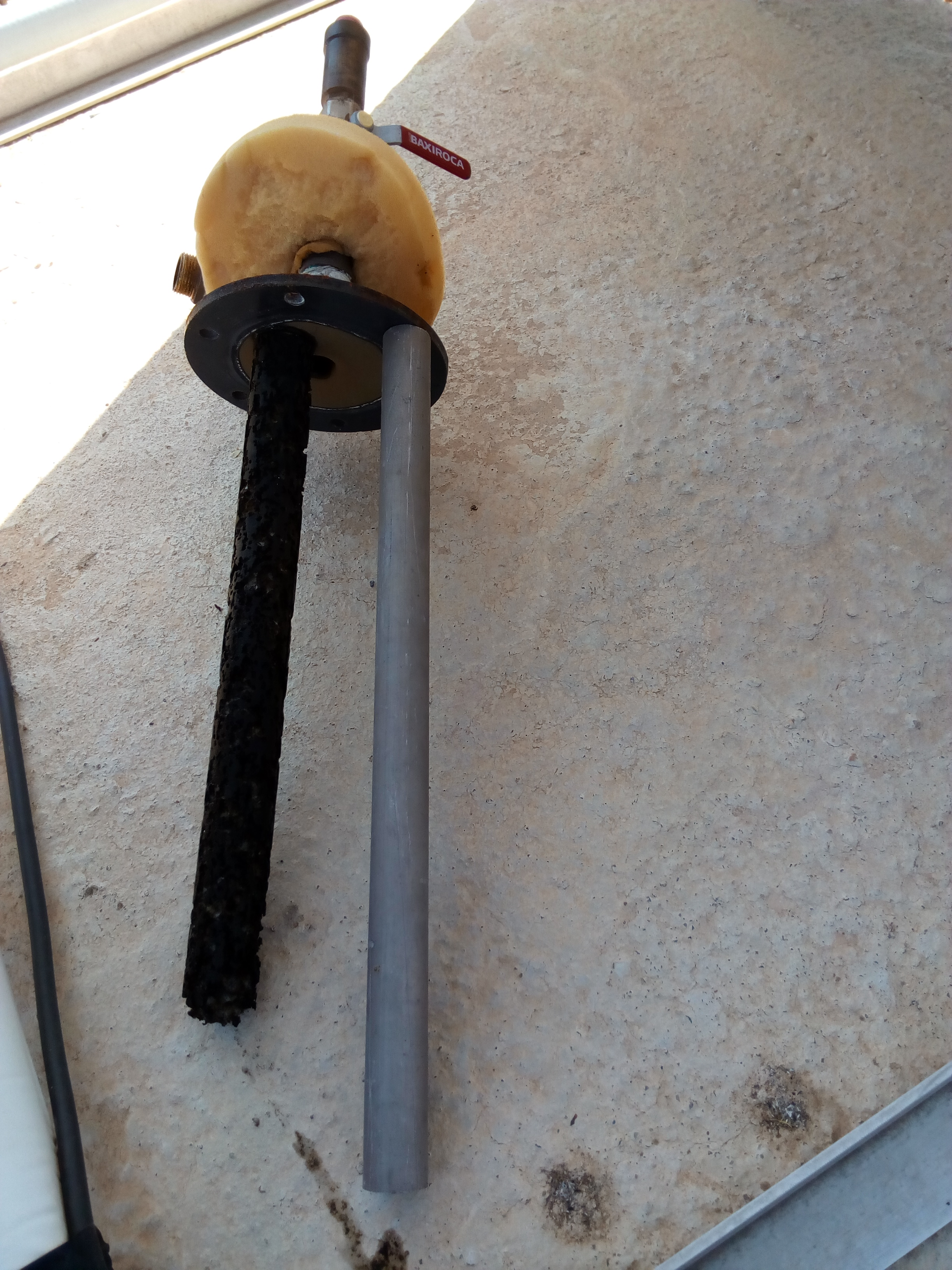 Ánodos de sacrificio de deposito de agua caliente, uno gastado por años de corrosión (Izquierda), otro nuevo a reponer (derecha)